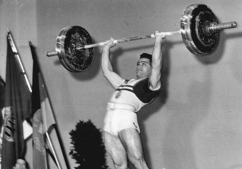 Erwin Miske Zentralbild 6.11.1965 Berlin: Deutsche Meister im Gewichtheben - Niske drückte Rekord. Leichtgewichtler Erwin Miske (ASK Vorwärts Leipzig) erreichte mit 120 kg im Drücken bei den Titelkämpfen der Gewichtheber am 06.11.1965 in Berlin-Weißensee (Volkshaus) einen Deutschen Rekord.